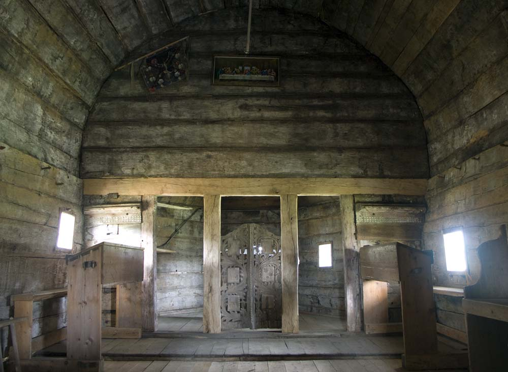 Biserica de lemn din Tusa, interiorul bisericii bărbaţilor.